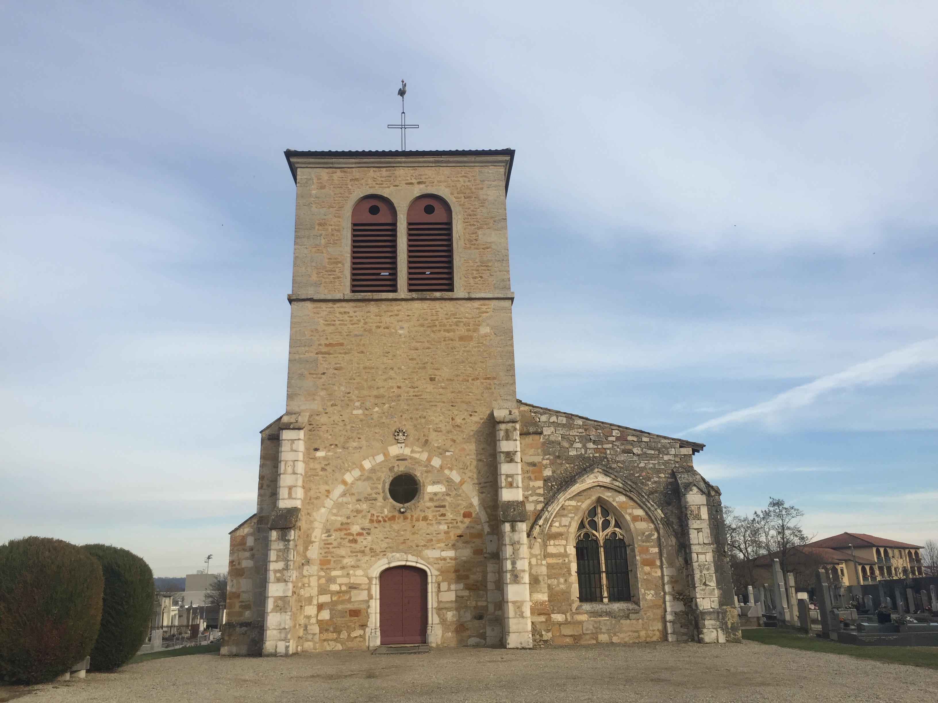 L'église Saint-Martin de Miribel dans l'Ain.